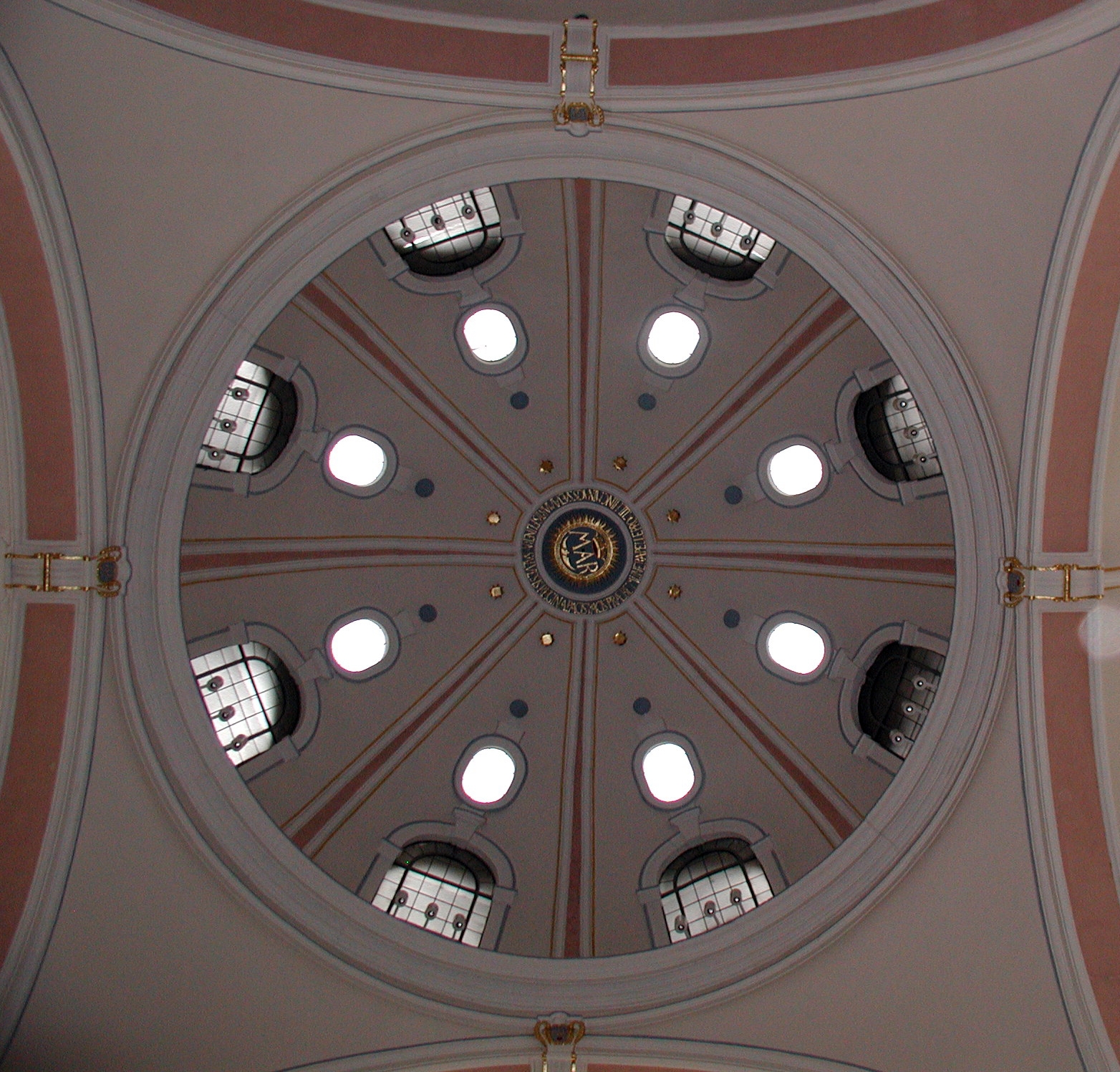 St. Maria vom Frieden, Köln